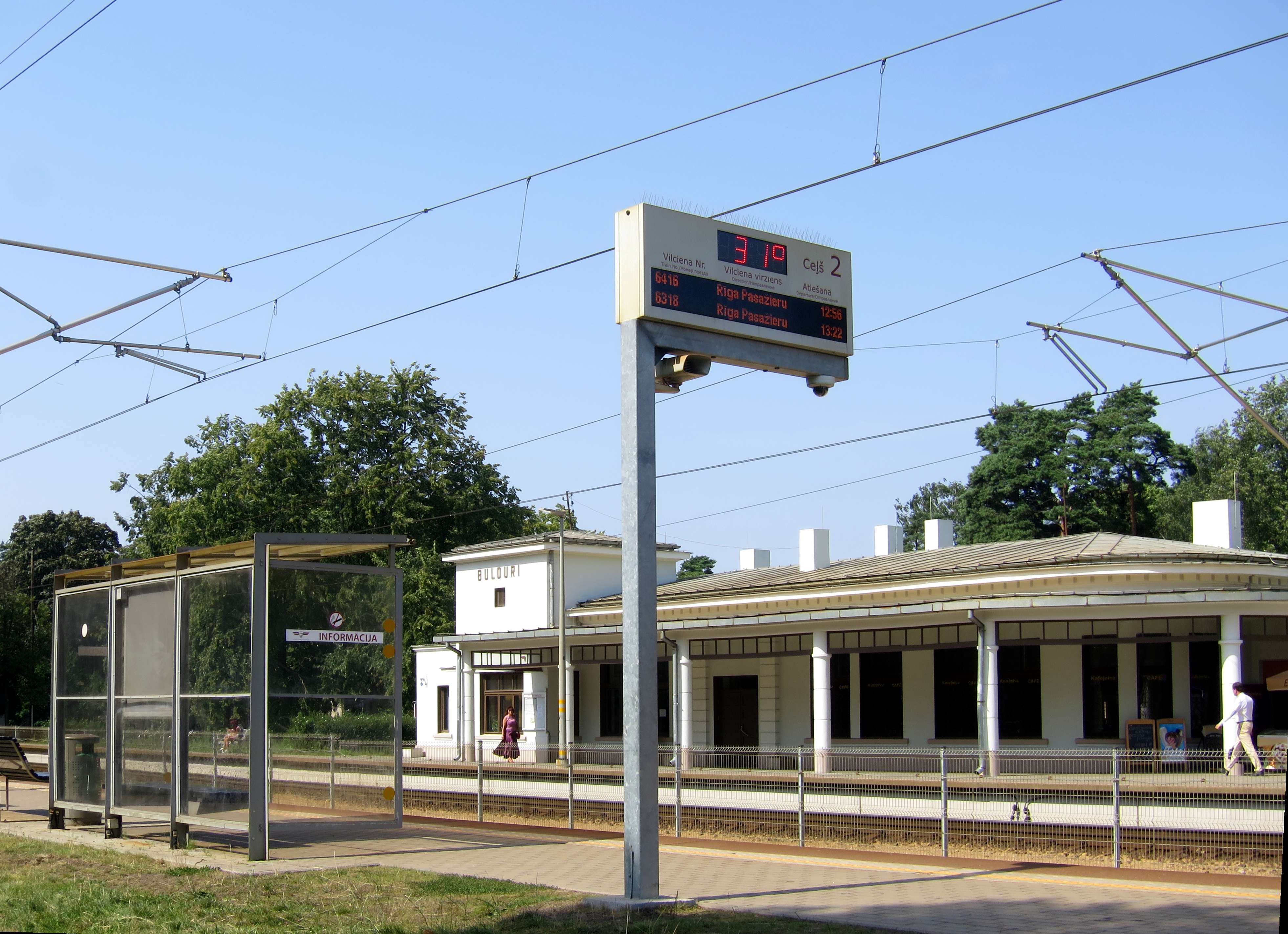 Bulduru stacija, 31 grāds uz tablo